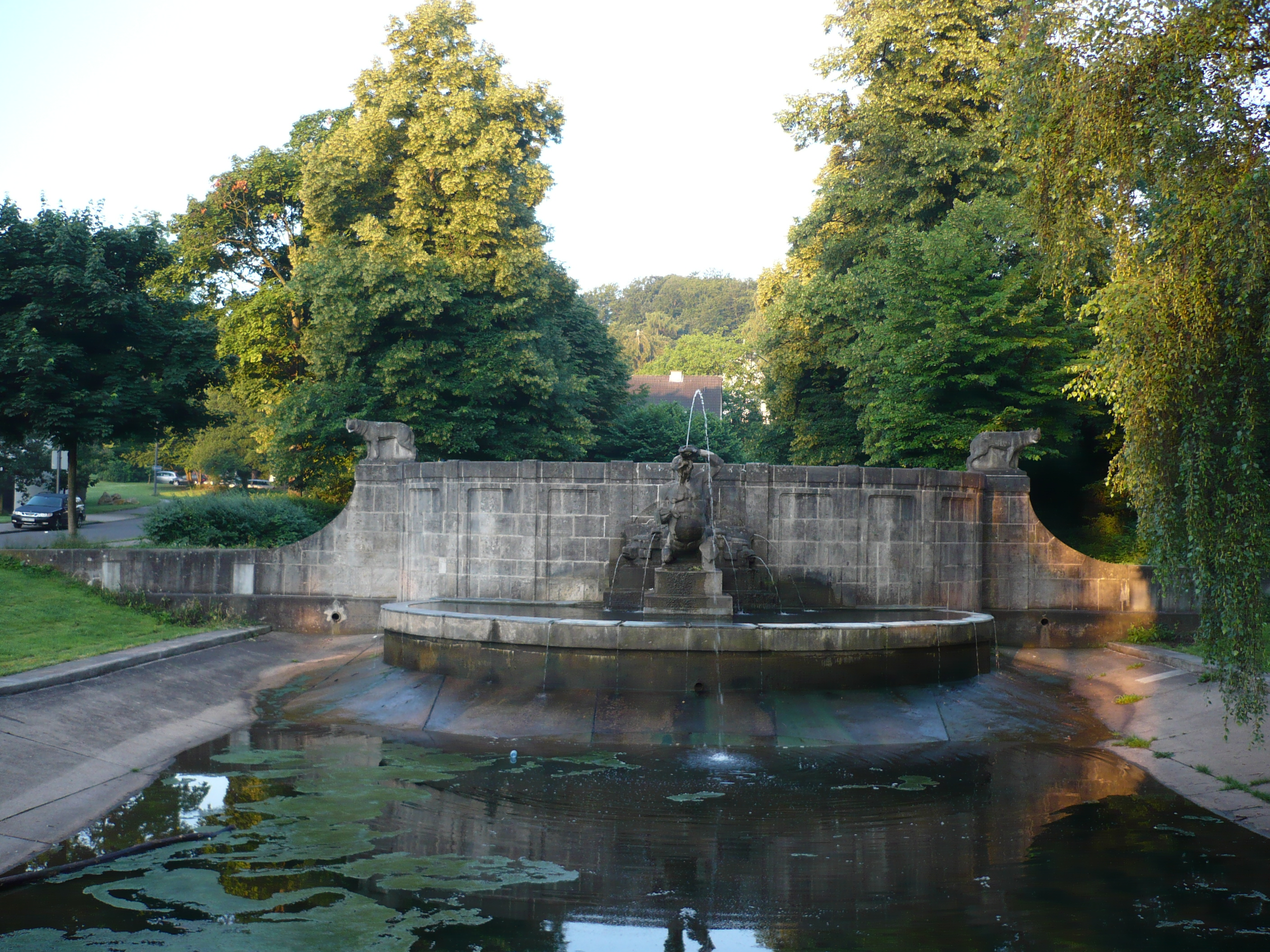 Tritonenbrunnen eingangs der Kaiser-Friedrich-Allee in Aachen. Früher am Platz vor dem Hauptbahnhof.